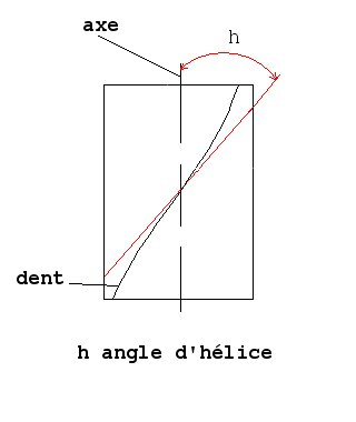 Shéma montrant l'angle d'hélice de la dent d'une fraise.